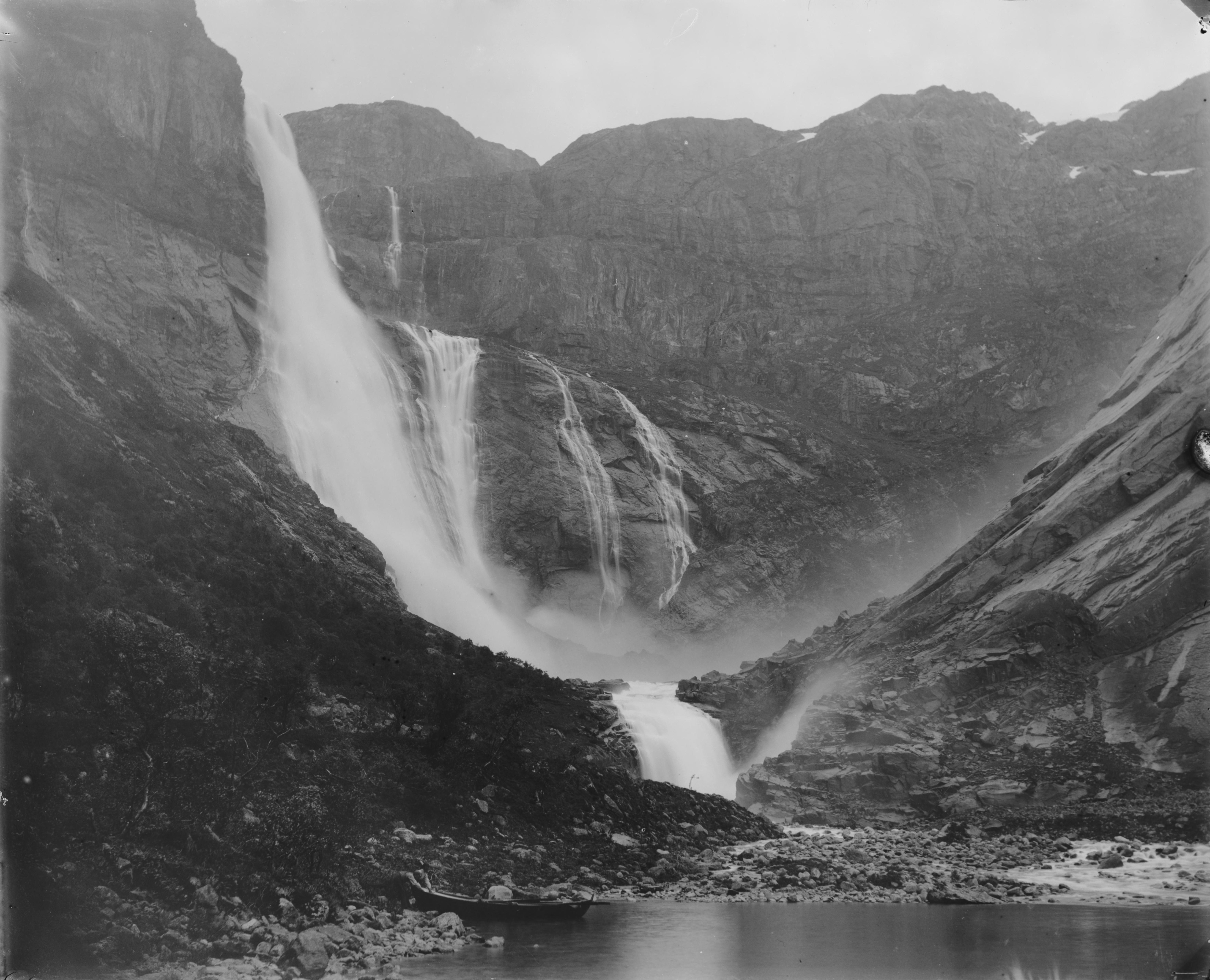 Påskrift konvolutt: Stor foss som forgrener seg til flere små. [Riksantikvaren] Sted: Ringedalsfossen,Skjeggedalsfossen,Hardanger Kommune: Odda Fylke: Hordaland Tagger: landskap foss